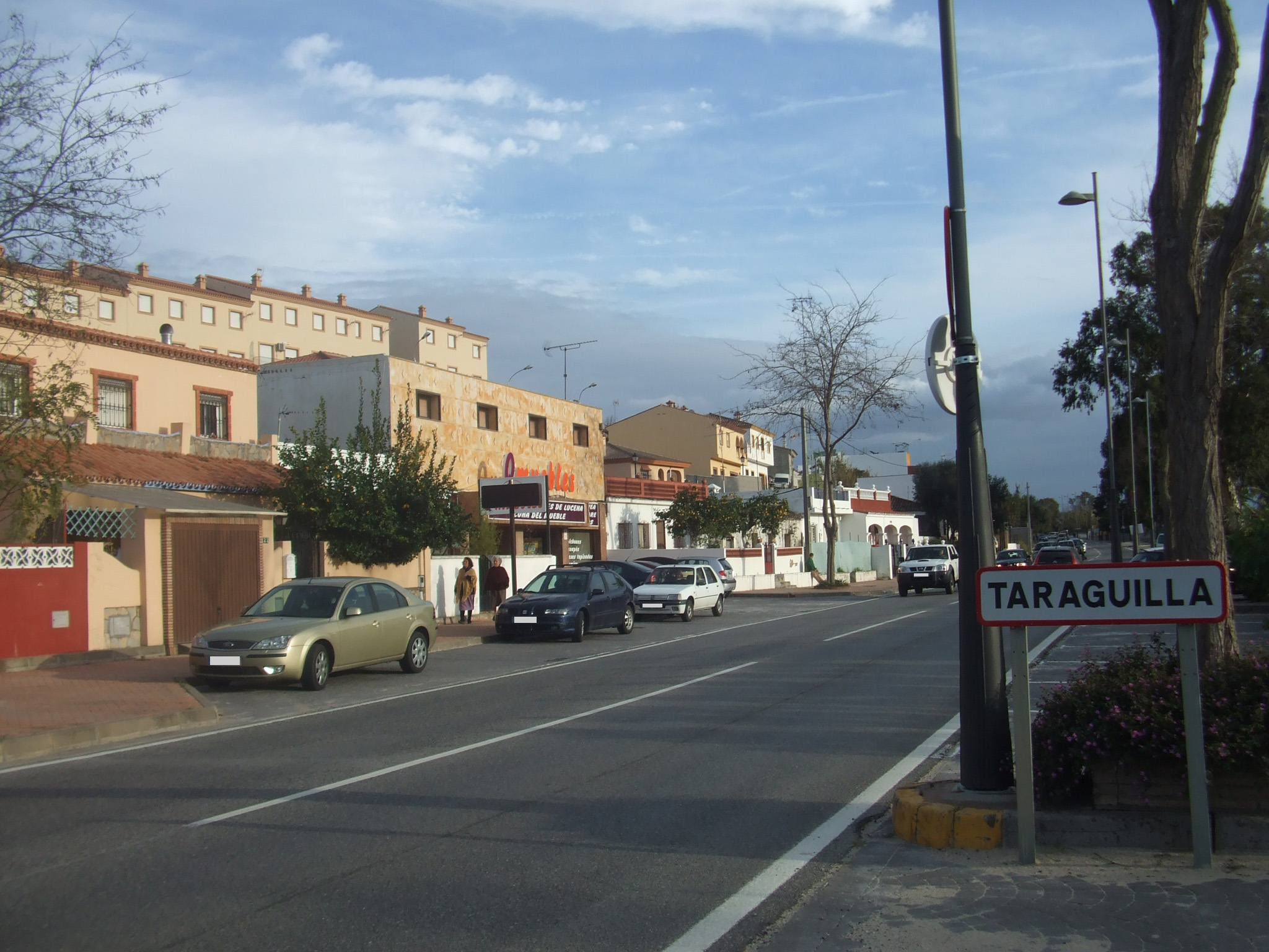 Avenida del Guadarranque, Taraguilla, San Roque.